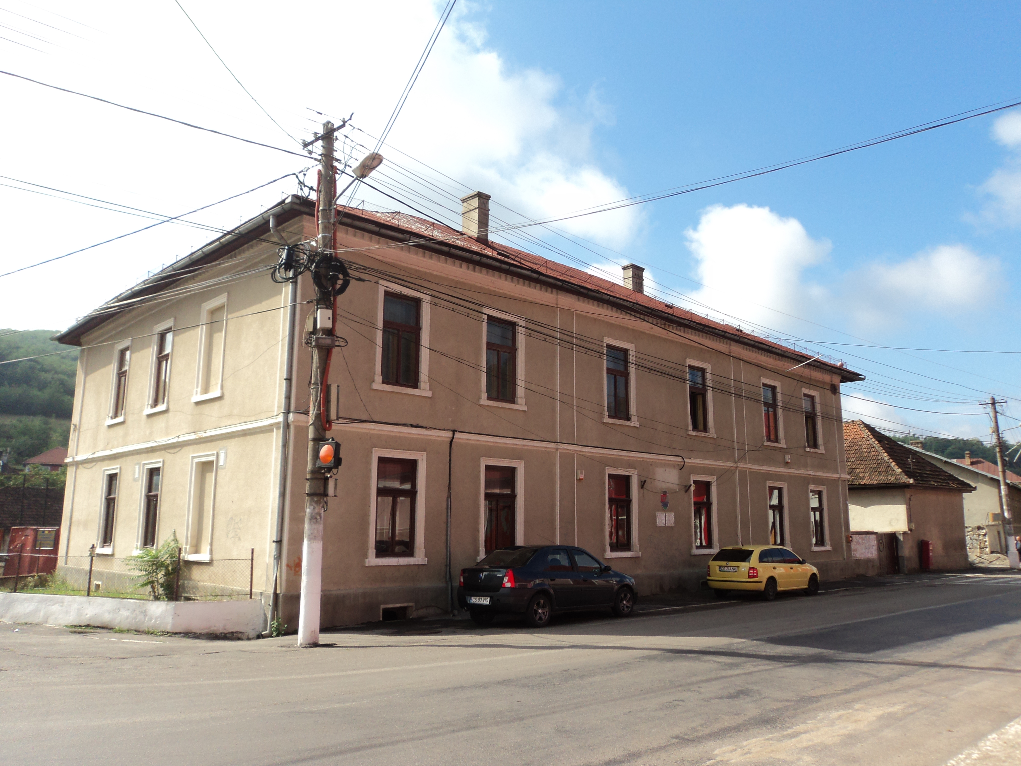 4000.3000, 4 MB Clădirea hotelului imperial din timpul imperiului austro-ungar